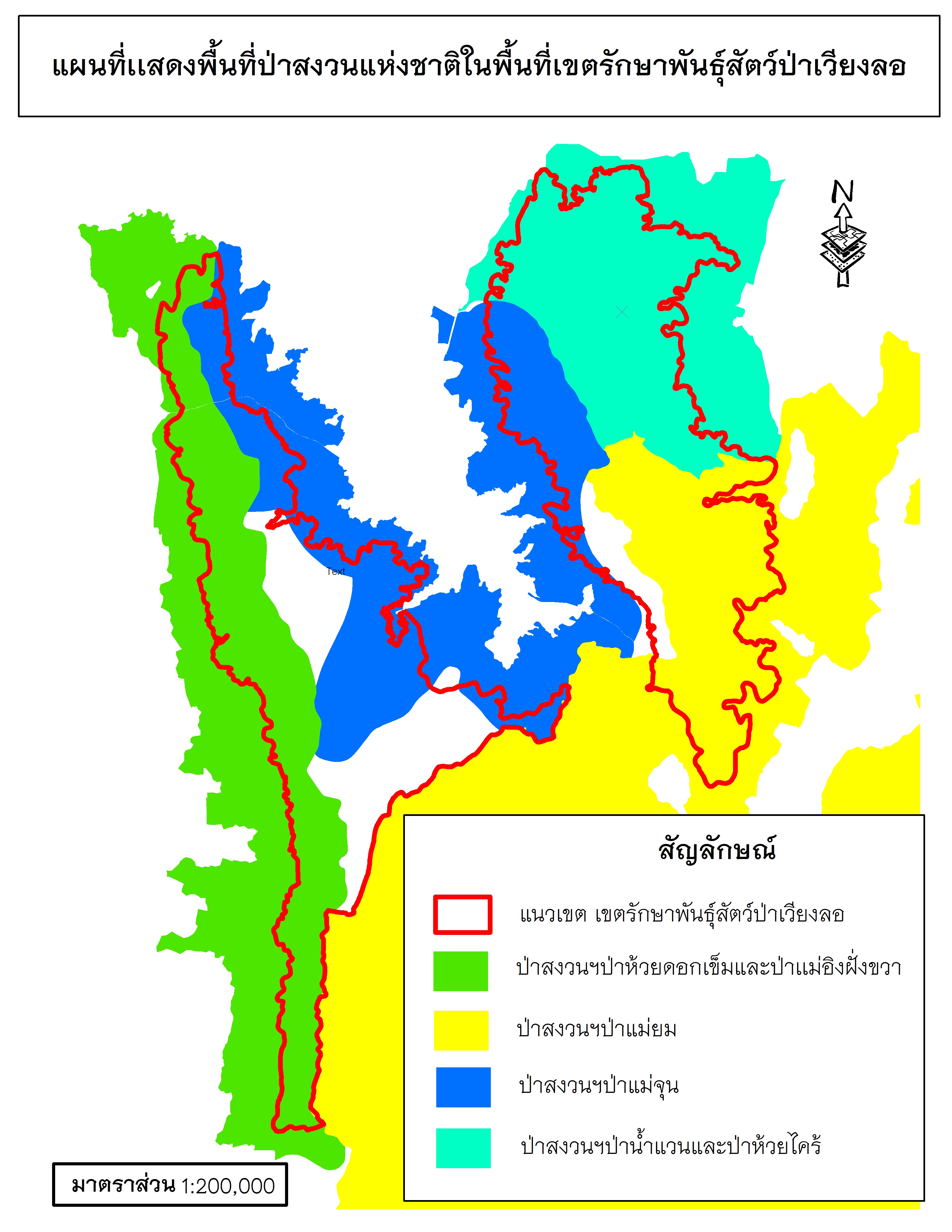 แผนที่ป่าสงวนภายในพื้นที่เขตรักษาพันธุ์สัตว์ป่าเวียงลอ